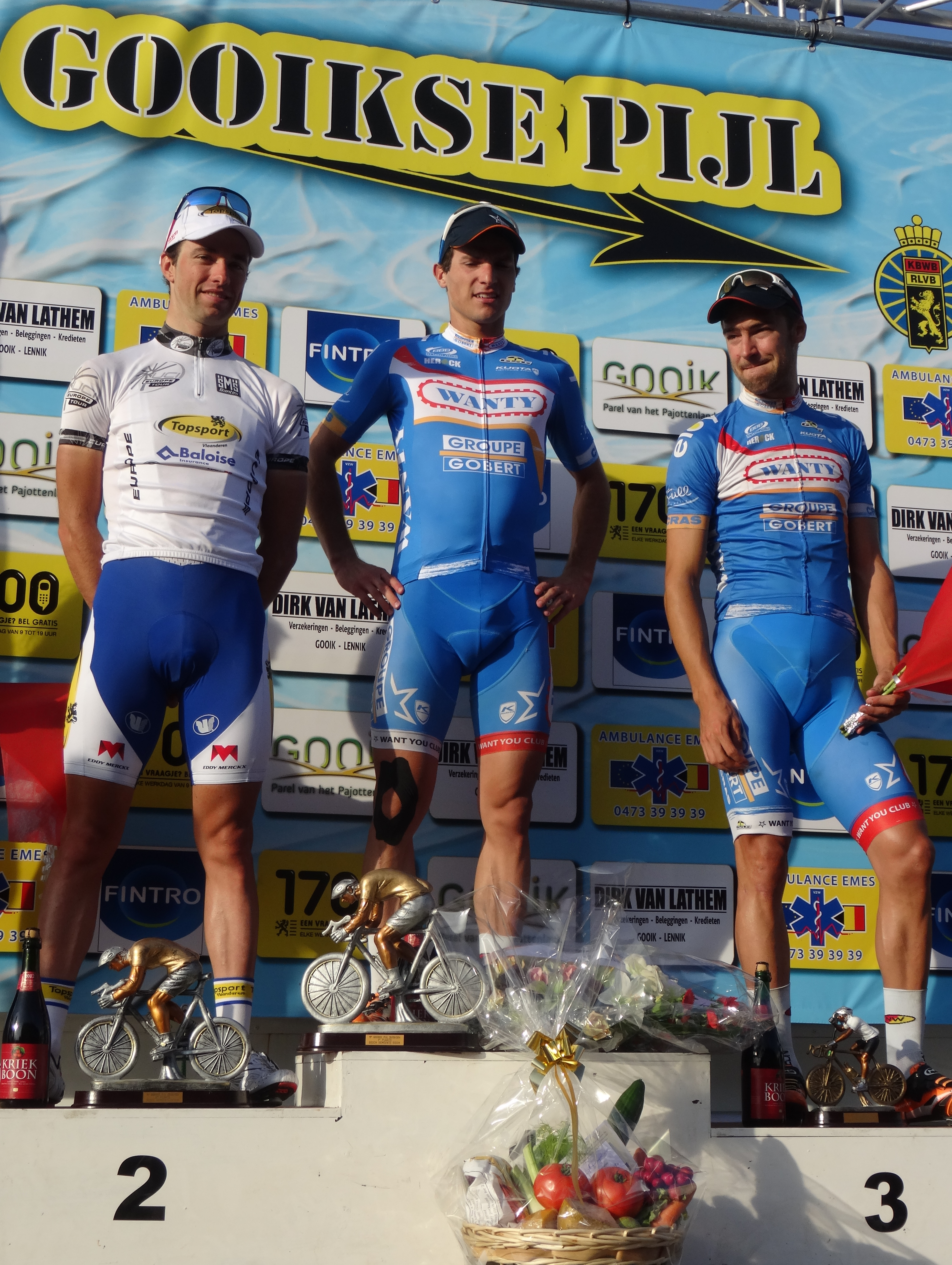 Reportage réalisé le dimanche 28 septembre à l'occasion du départ et de l'arrivée de la Gooikse Pijl 2014 à Gooik, Belgique.